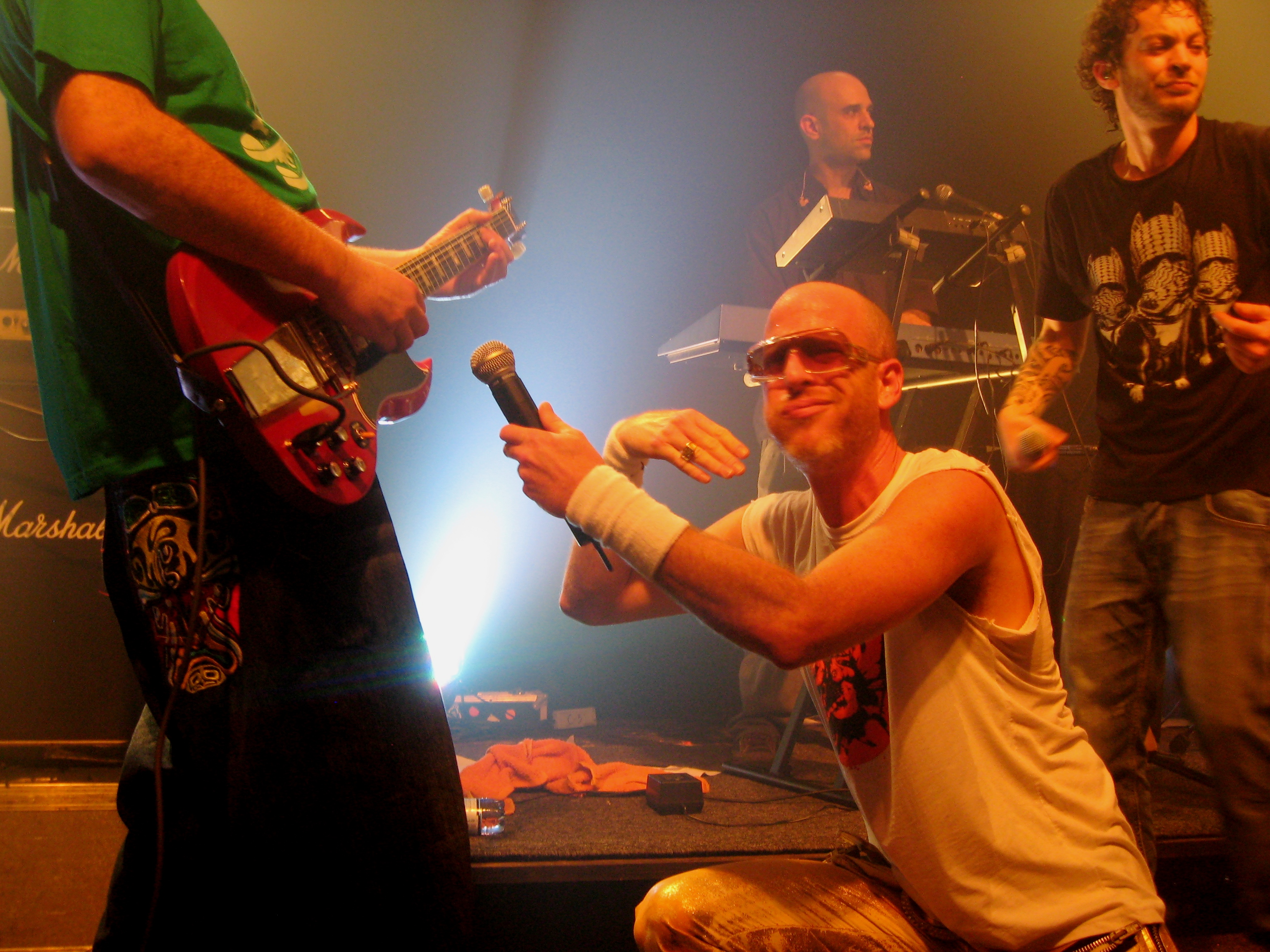 עמיר ירוחם במהלך הופעה של שב"ק ס' במועדון הבארוק בבאר-שבע